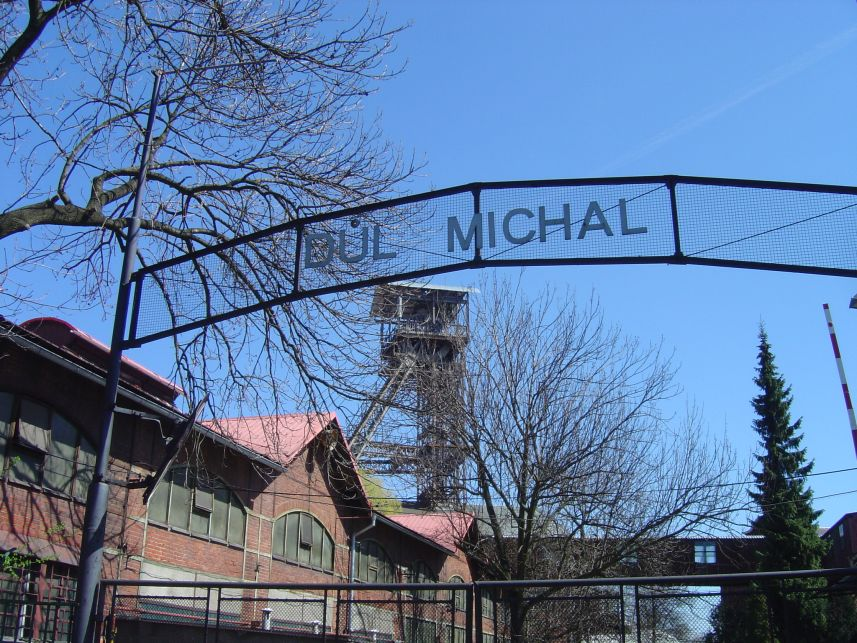 Důl Michal v Ostravě